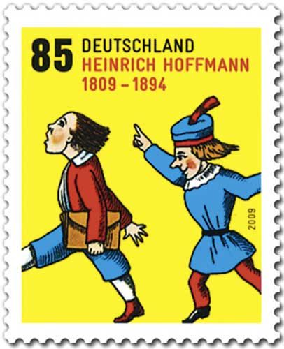 200. Geburtstag von Heinrich Hoffmann (1809–1894)